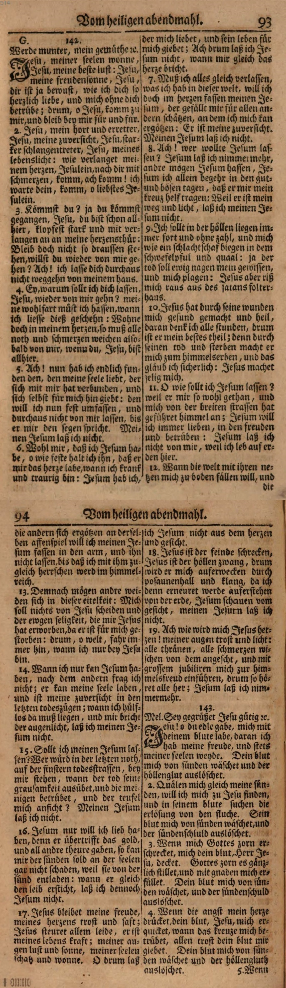 Martin Janus: Jesu, meiner Seelen Wonne, Version in Schemellis Gesangbuch (Leipzig 1736), an dem Johann Sebastian Bach mitarbeitete. Die 6. und die 17. Strophe verwendete Bach in seiner Kantate 147 Herz und Mund und Tat und Leben. Dem Text wurden verschiedene Melodien zugeordnet, u.a. Alle Menschen müssen sterben. Bei Schemelli steht die Melodieangabe Werde munter, mein Gemüte. Diese Melodie (Evang. Gesangbuch 475) legte Bach seiner berühmten Bearbeitung Wohl mir, dass ich Jesum habe / Jesus bleibet meine Freude zu Grunde.